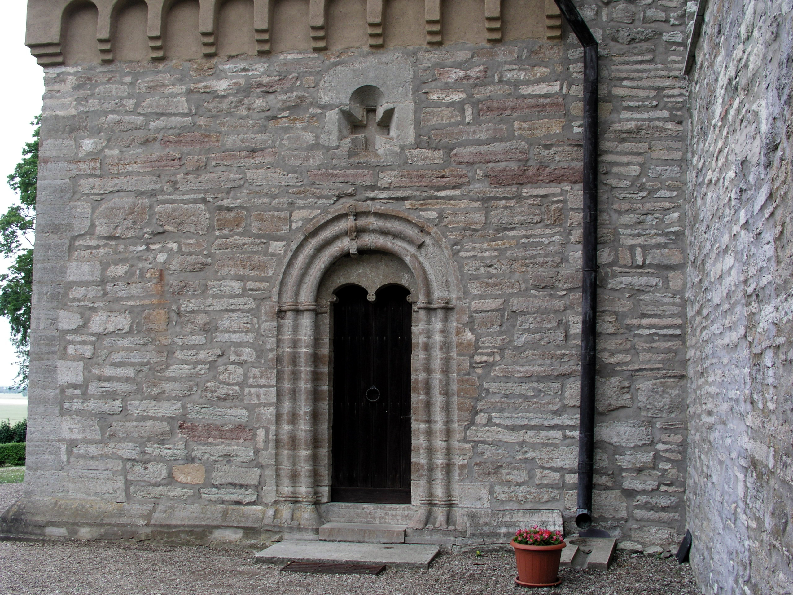 Heda kyrka, Diocese of Linköping, Ödeshögs kommun. Portal.